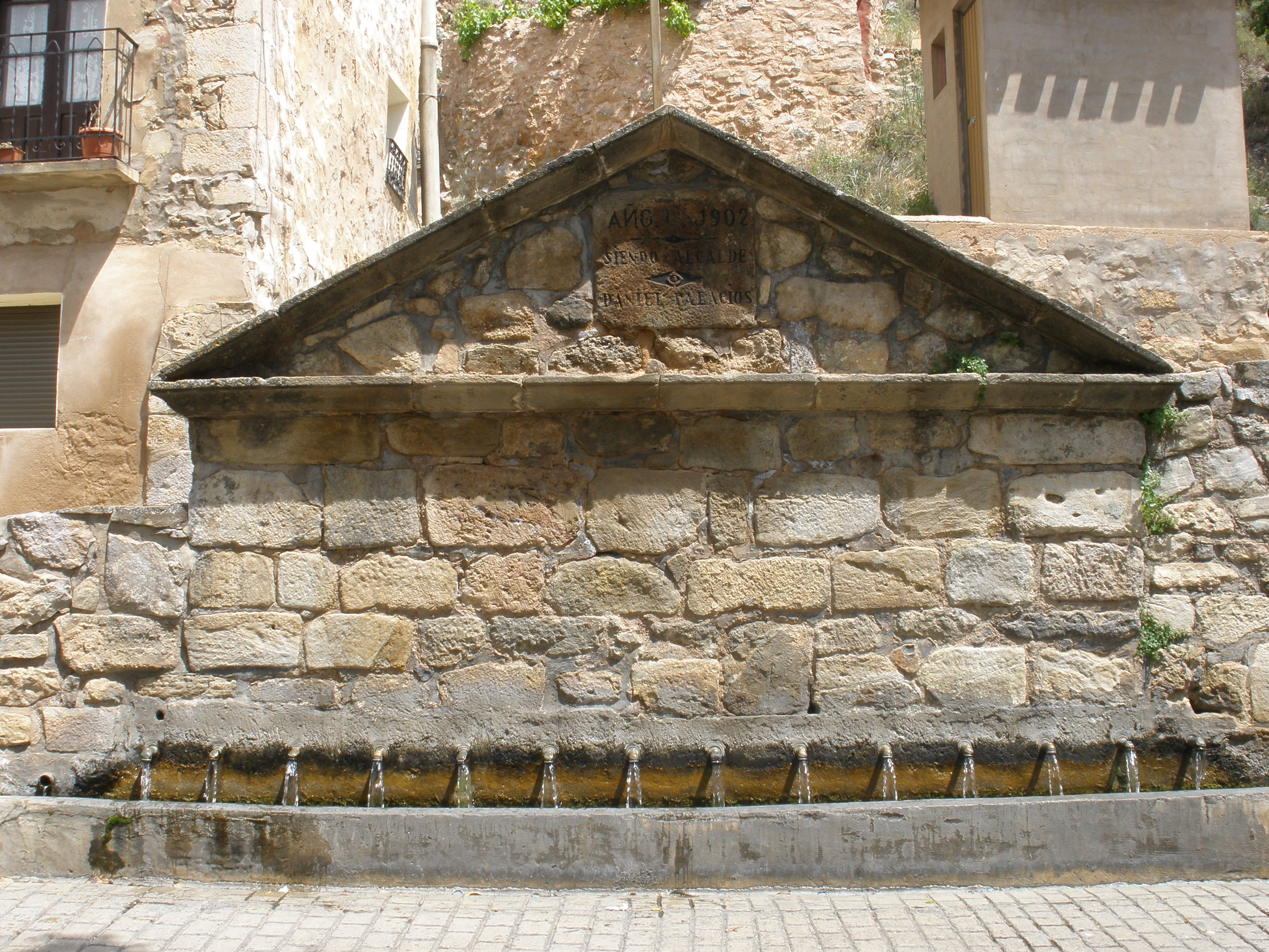 La fuente de Muro de Aguas (La Rioja, España).